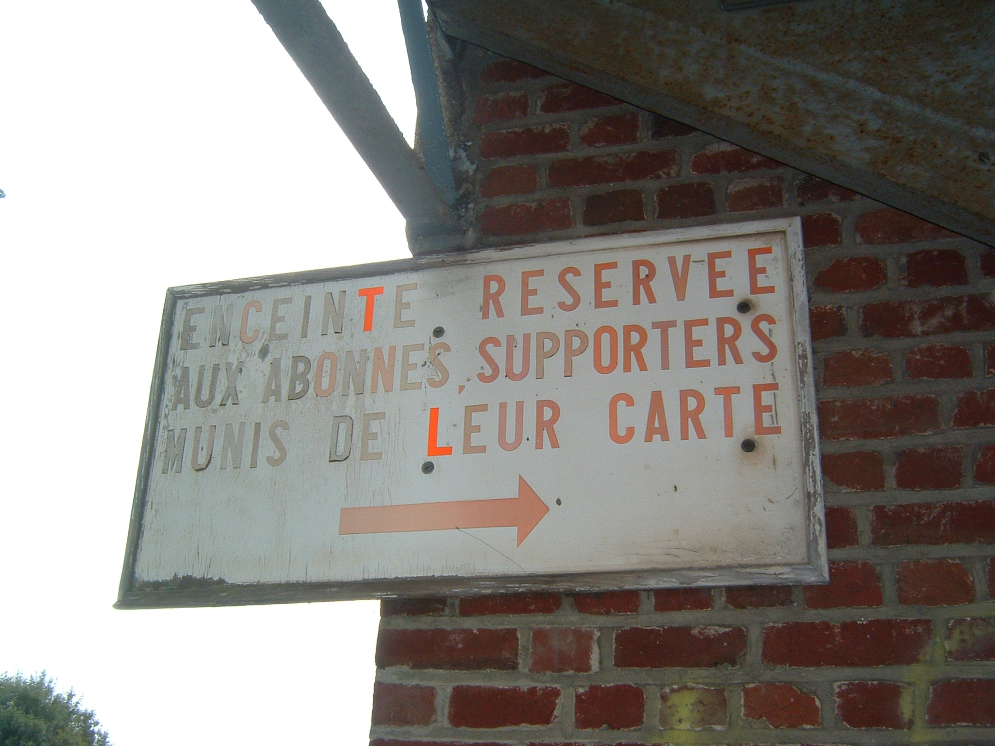 Entrée de l'escalier abonnés de la Tribune de fer